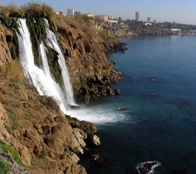 Düden Waterfall